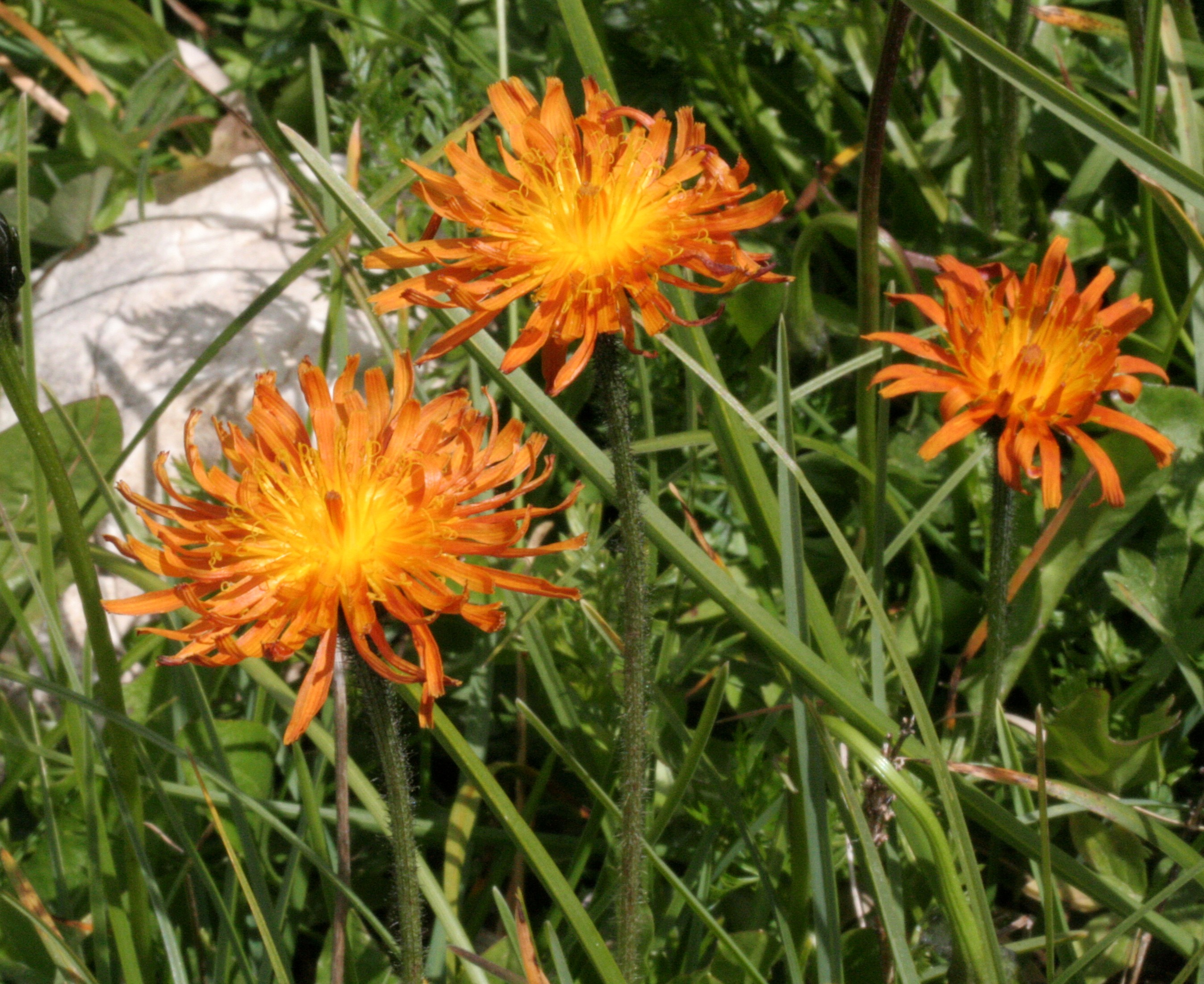 Crepis_aurea (Radichiella aranciata) Località : Passo di Falzarego, Cortina (BL), 2105 m s.l.m.